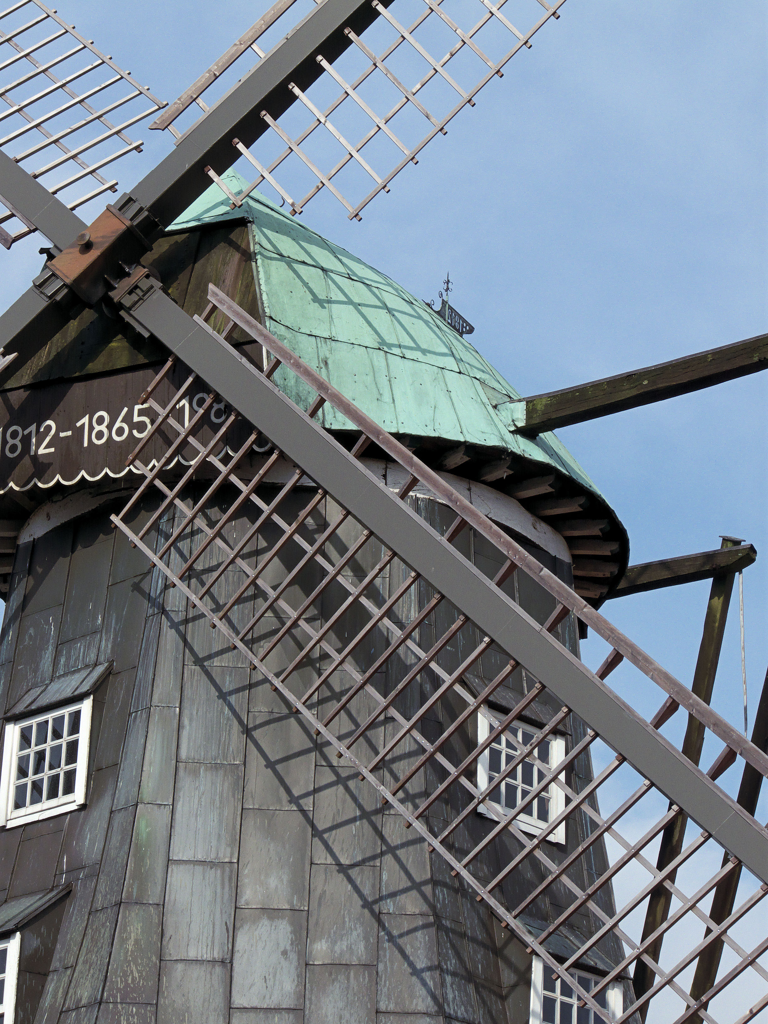 Windmolen Windmühle Menke, Südlohn, Duitsland, kap met koper bedekt.